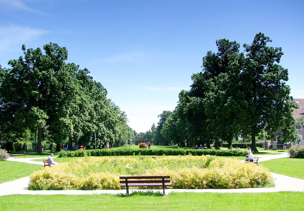 Zgorzelec, zespół parków miejskich, 1870-1930, nr rej.: A/1242/1-2 z 29.05.2009 - Park Paderewskiego